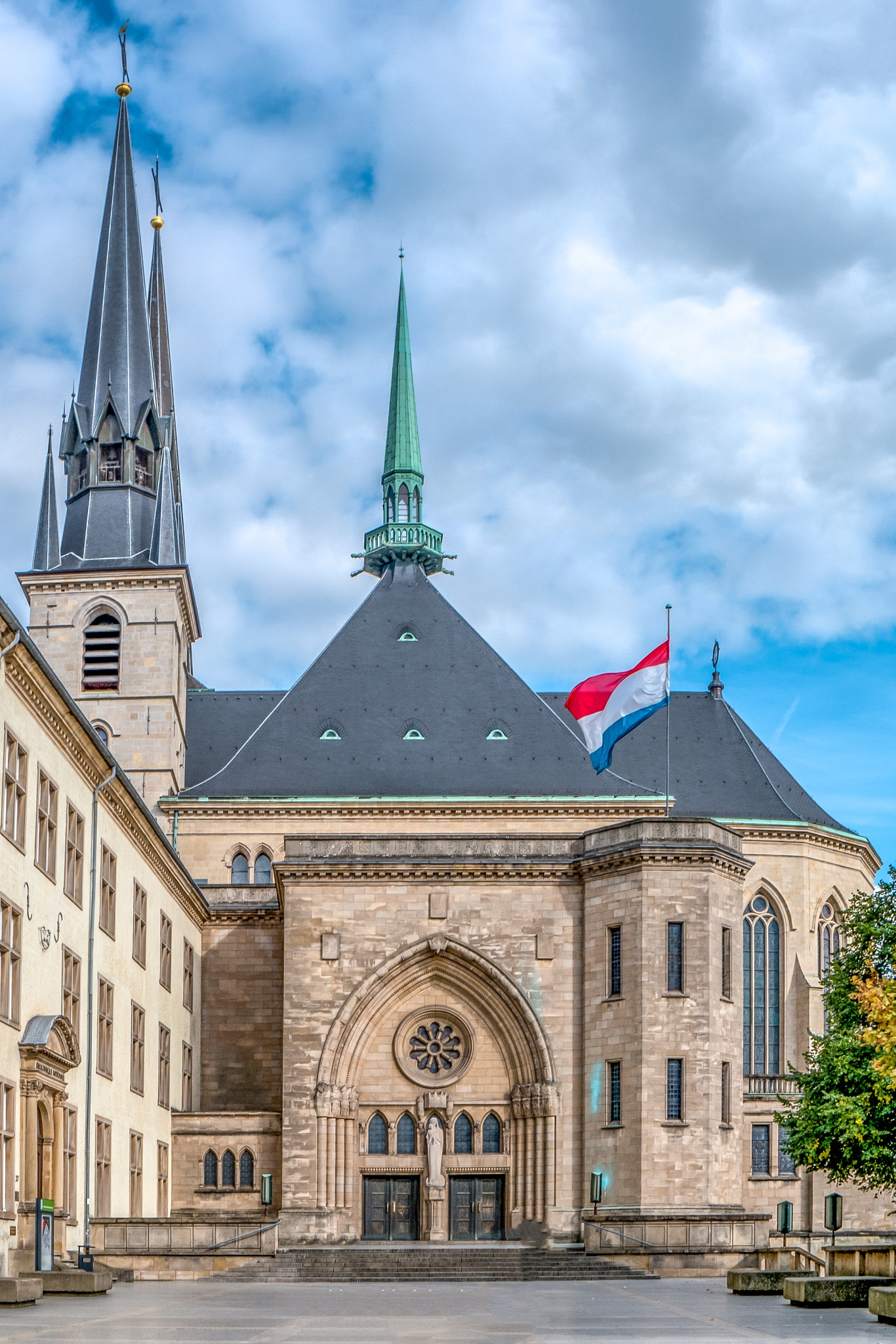 500px provided description: Luxembourg City Eurotrip [#Flag ,#Luxembourg ,#Luxemburg ,#Eurotrip ,#L?tzebuerg ,#Luxembourg City]